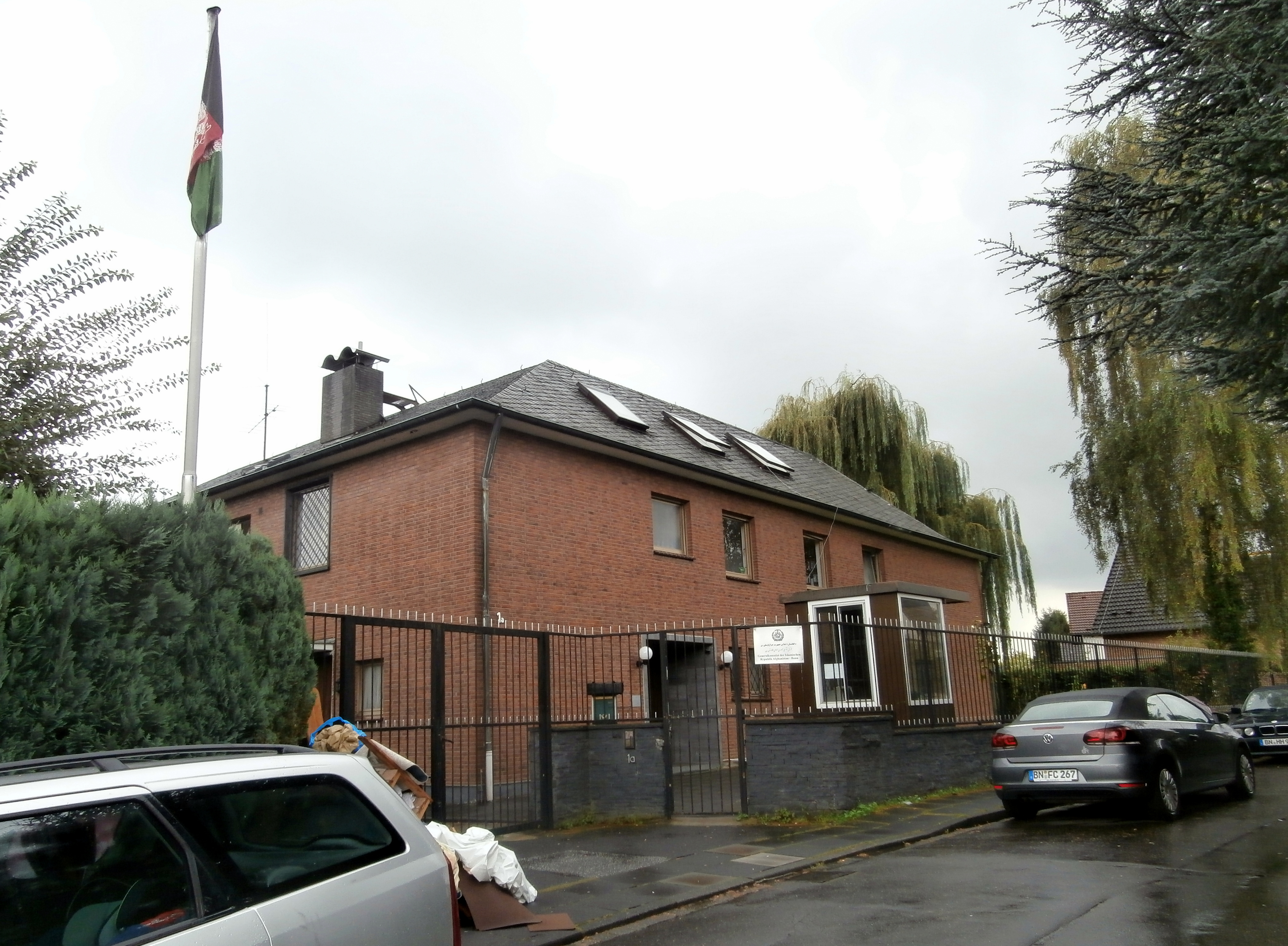 Generalkonsulat und ehemaliges Kanzleigebäude der Botschaft von Afghanistan, Liebfrauenweg 1a, Bonn-Ückesdorf